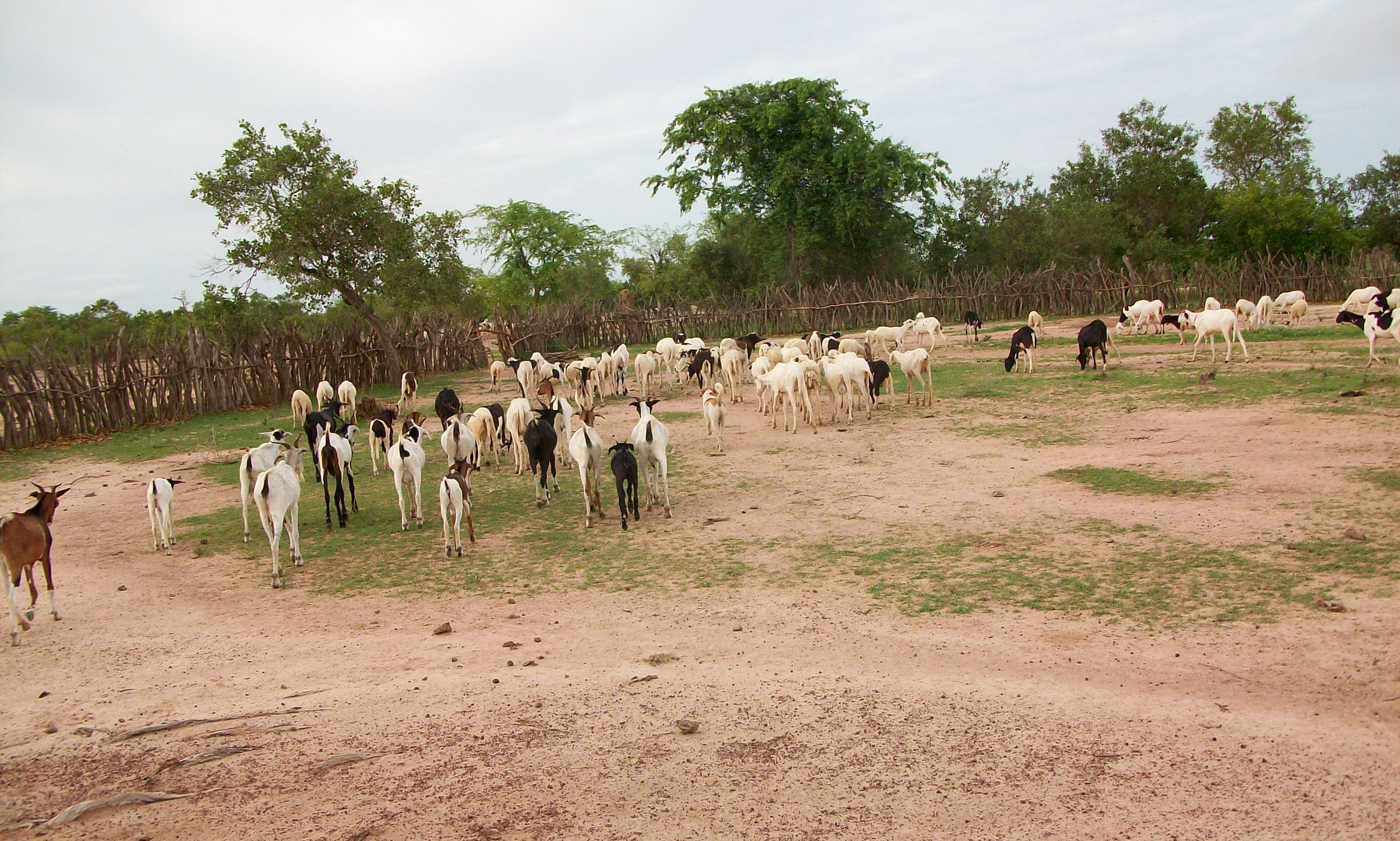 Des pâtures dans le village de Doudé Bagué (Sénégal)